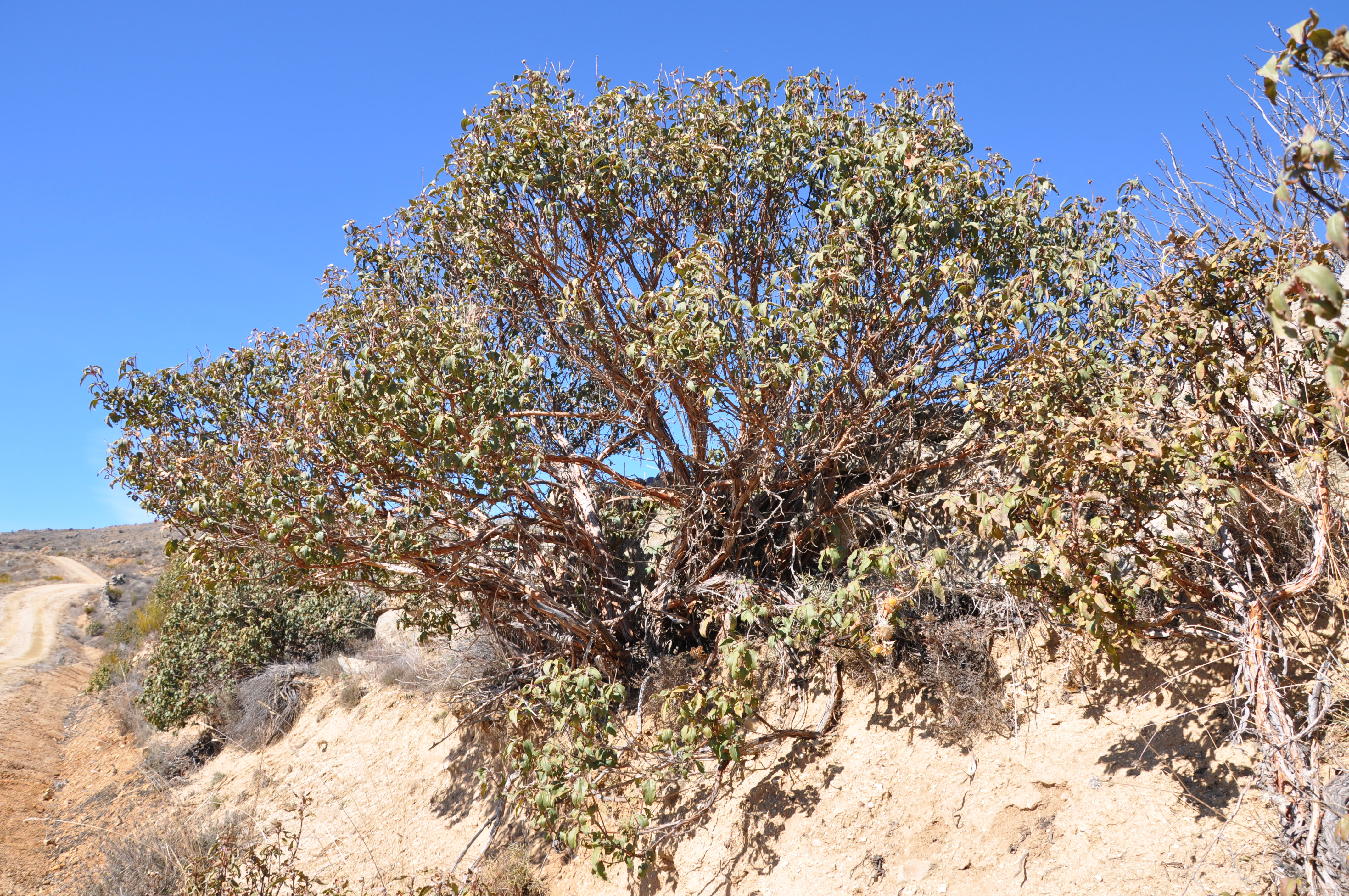 Hábito de jara estepa (Cistus laurifolius), Sierra de Ávila, España.